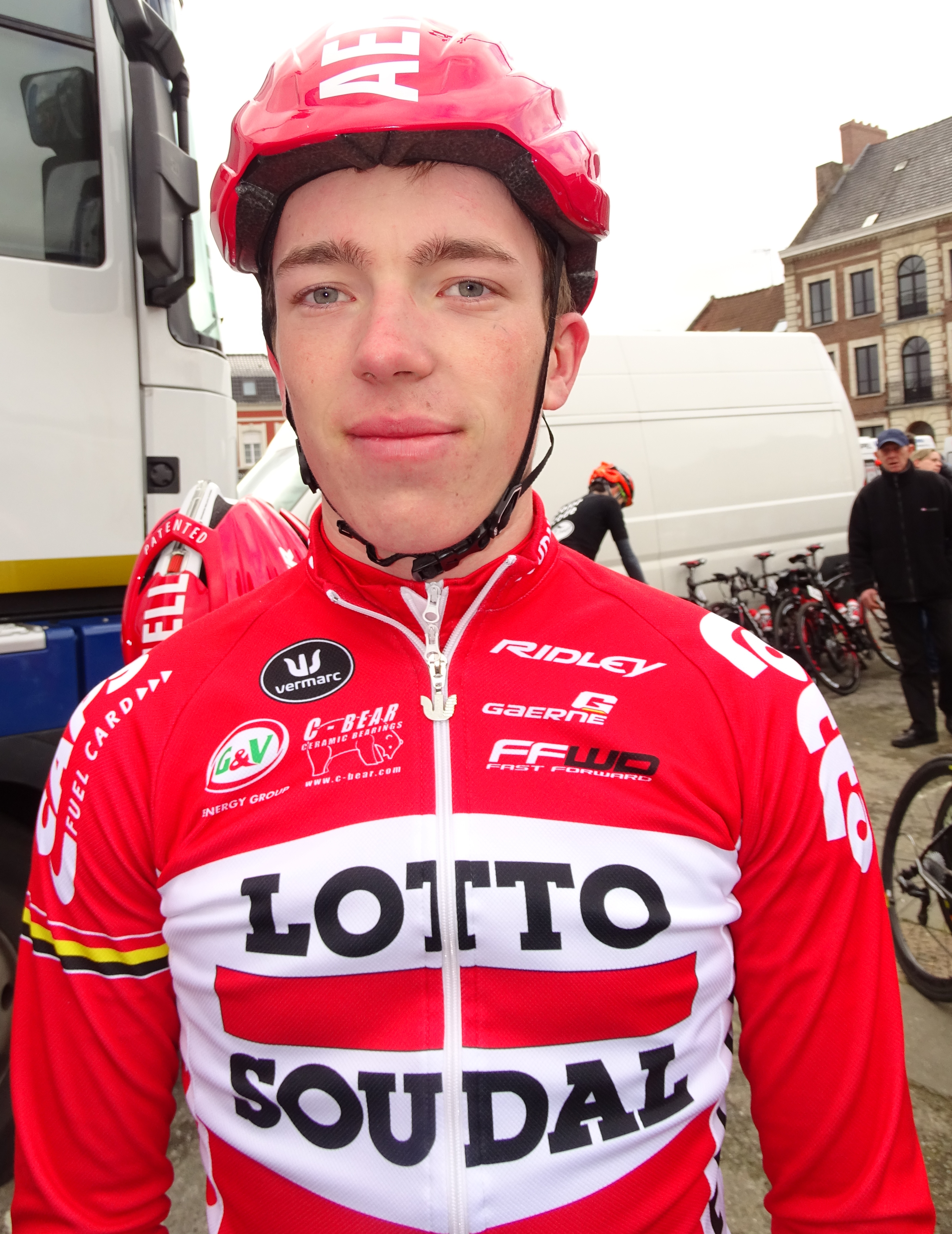 Reportage réalisé le dimanche 6 mars à l'occasion du départ et de l'arrivée du Grand Prix de Lillers-Souvenir Bruno Comini 2016 à Lillers, Pas-de-Calais, Nord-Pas-de-Calais, France.